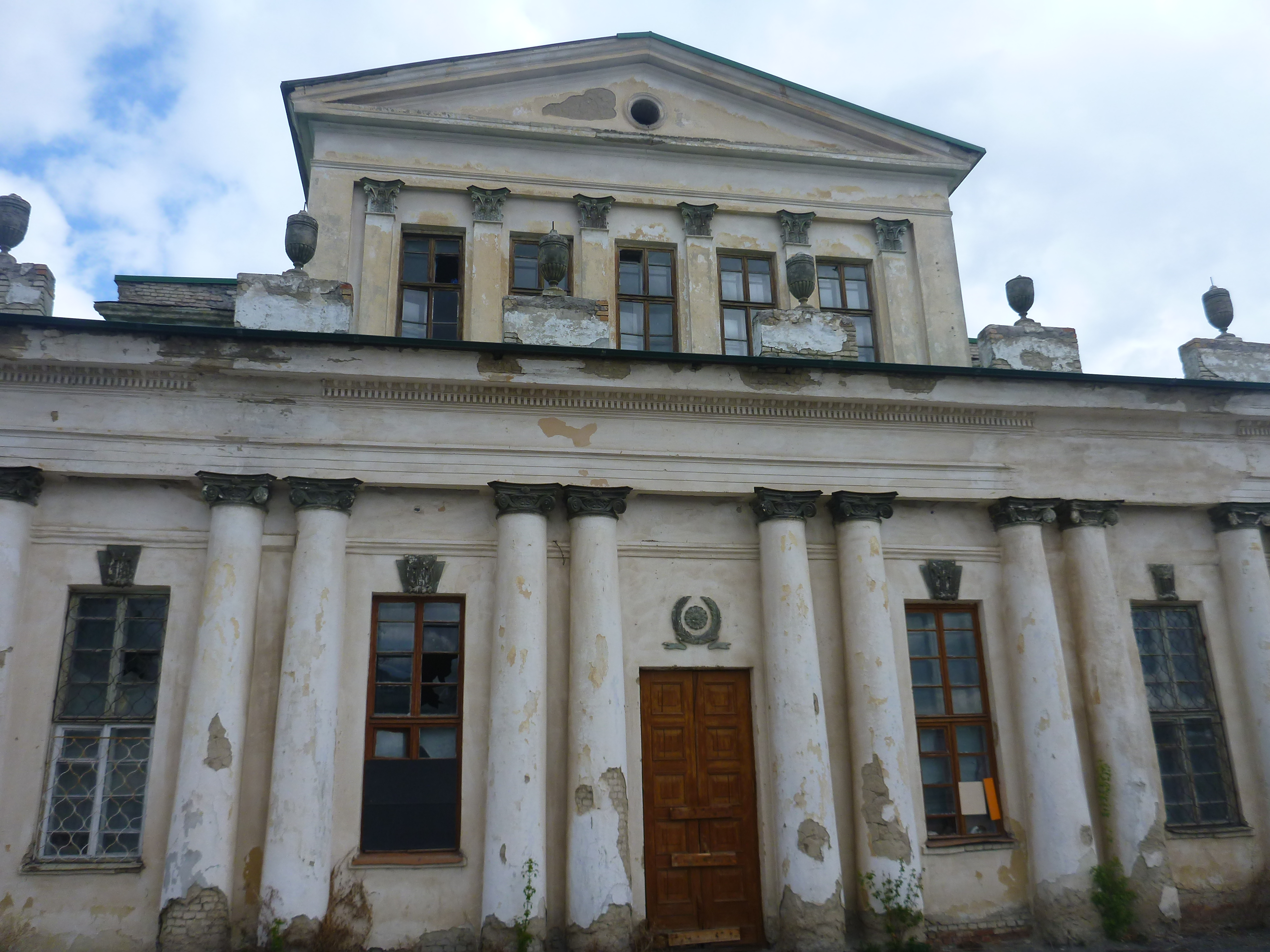 Складские помещения Каменского завода